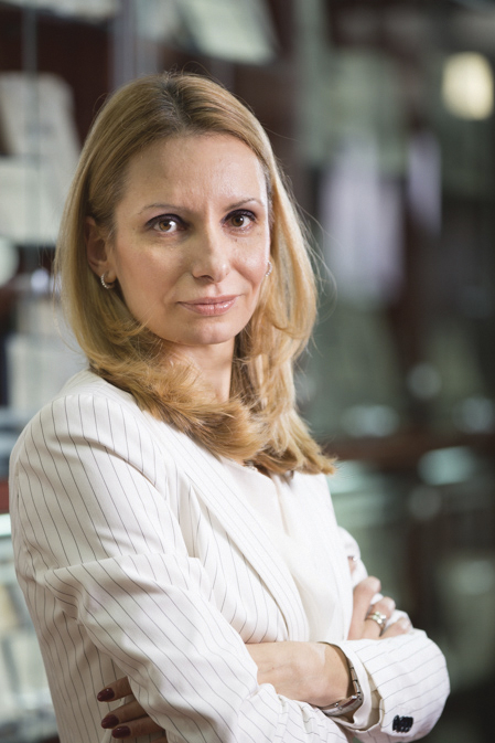 Српски (ћирилица): проф. др Сандра Фишер-Шобот